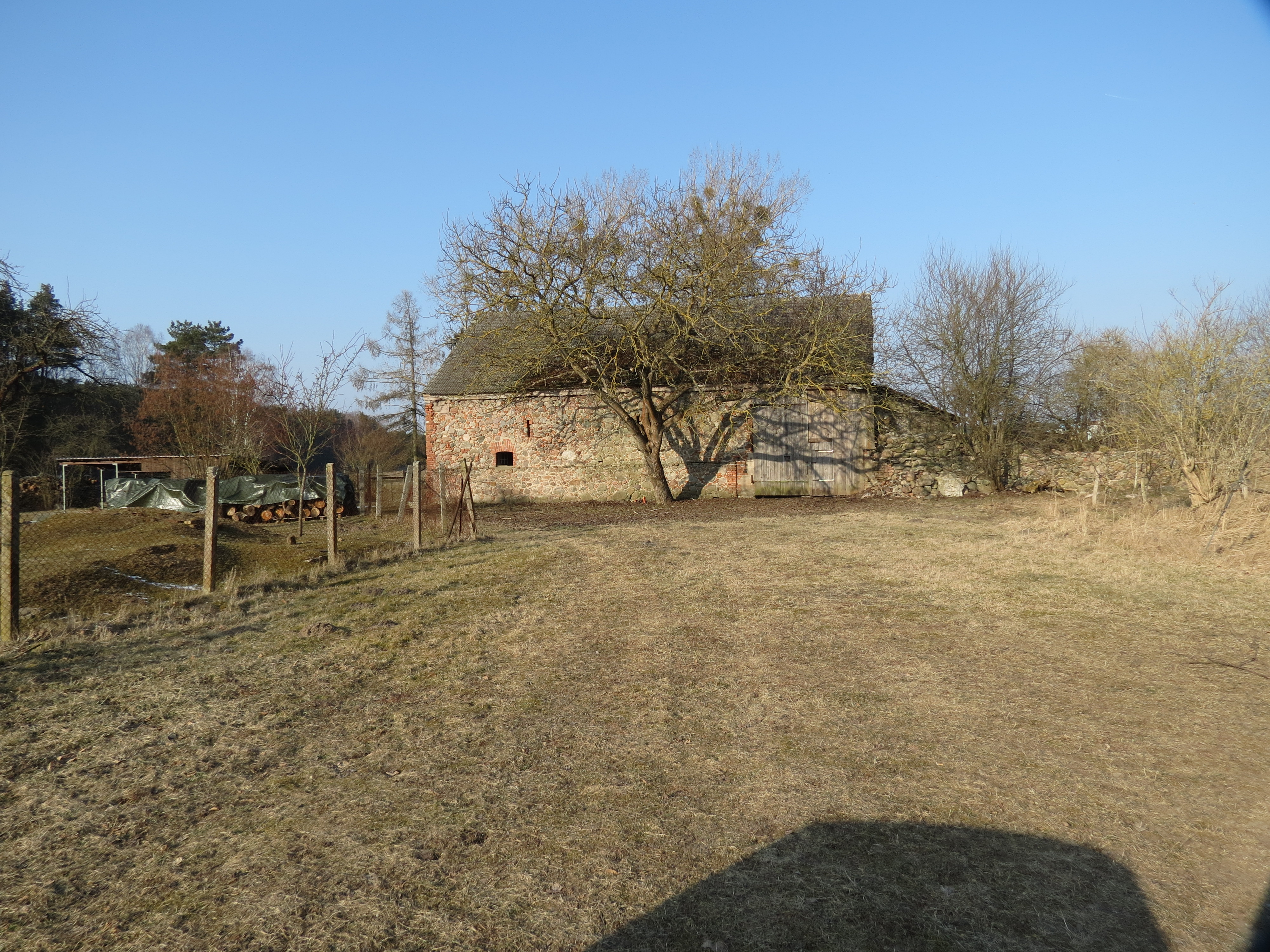 Heinrichsfelde, Ortsteil Heinrichsdorf, Stadt Rheinsberg, Lkr. Ostprignitz-Ruppin, Brandenburg